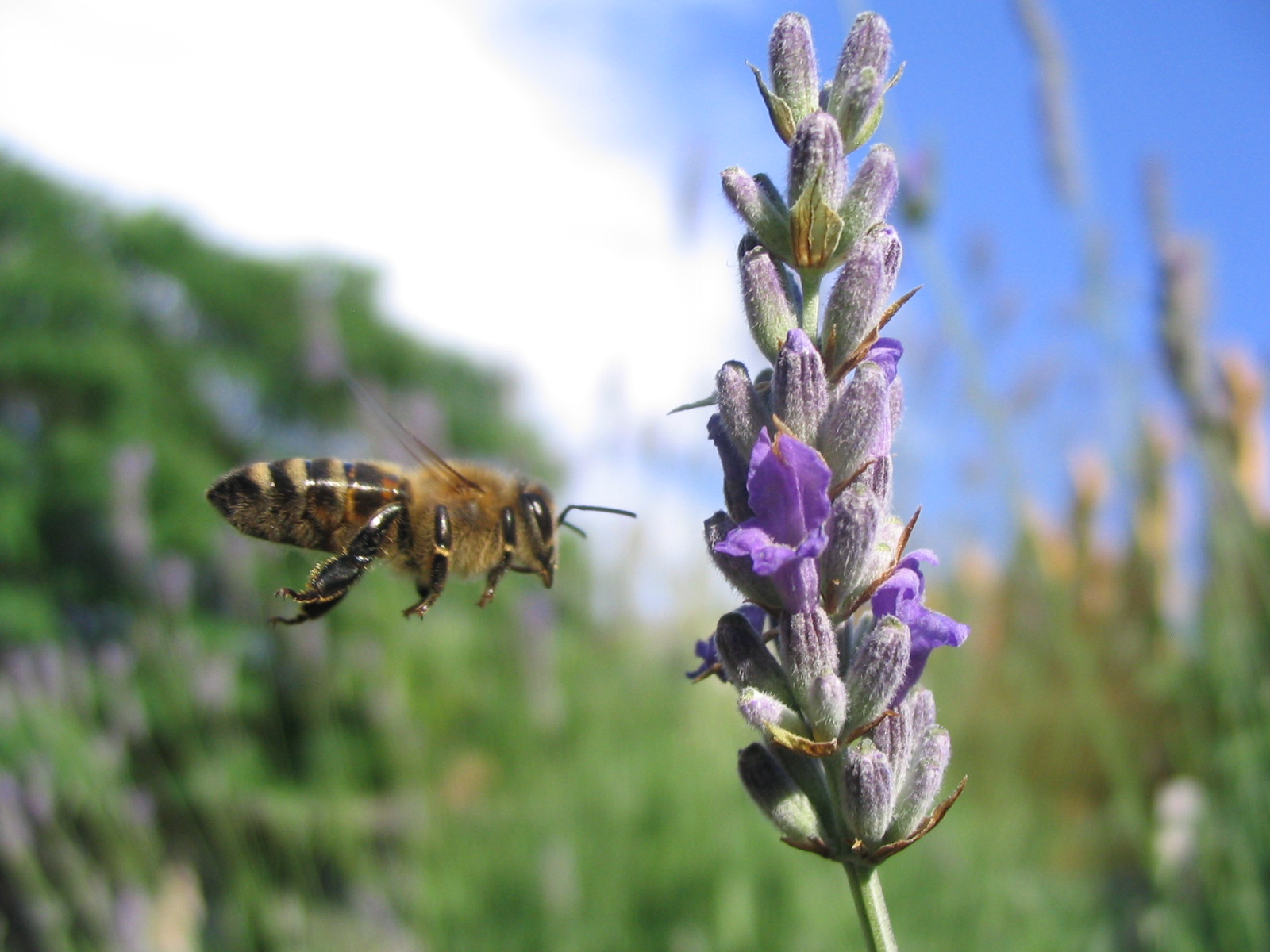 Bee and lavander